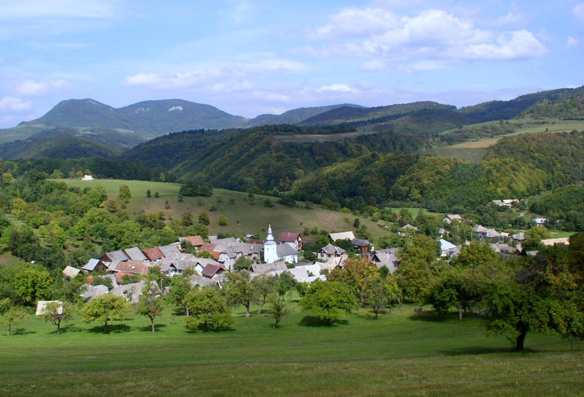 Obec Markuška (Slovensko, okres Rožňava)